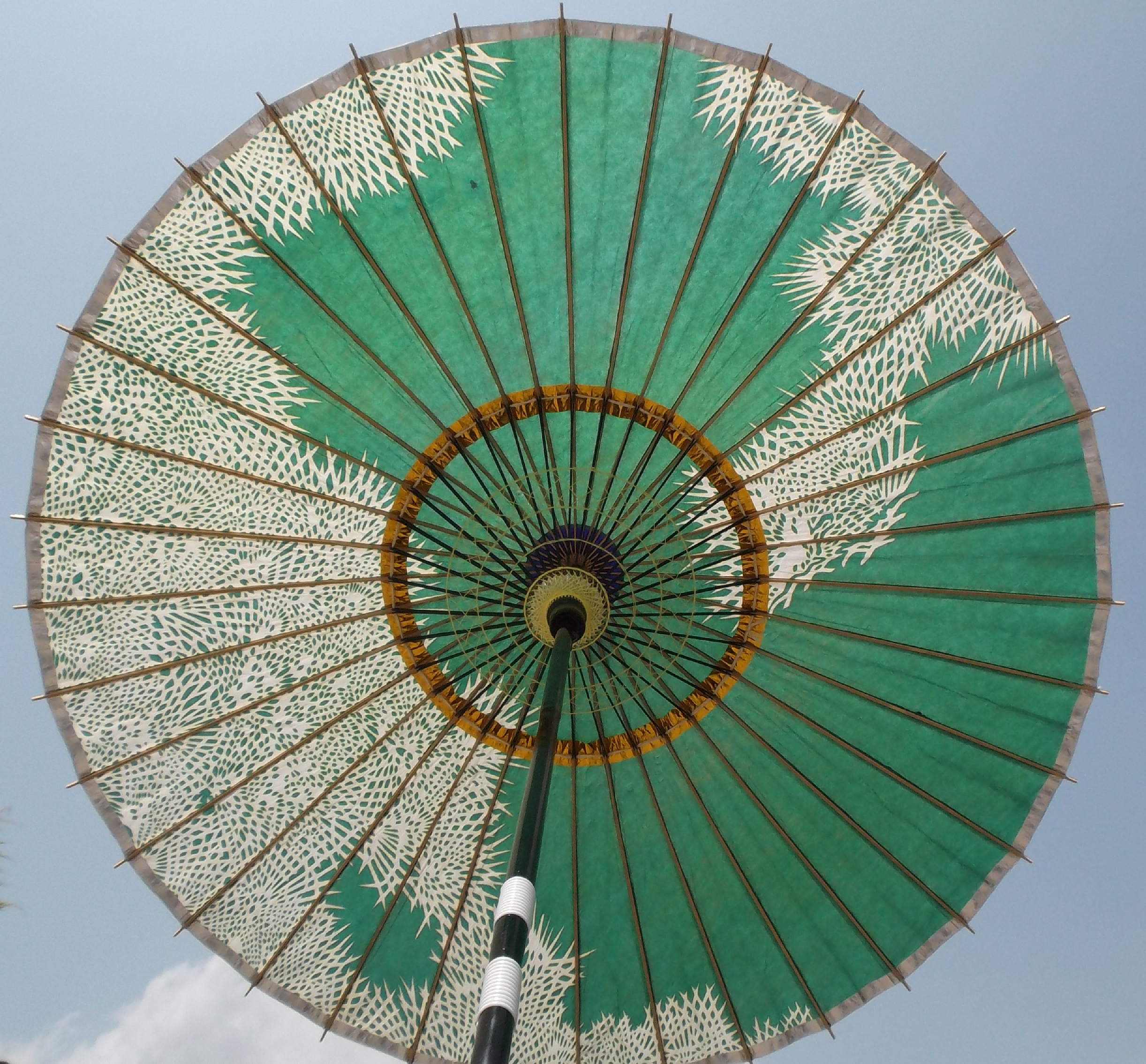 香川県高松市でつくられている日傘